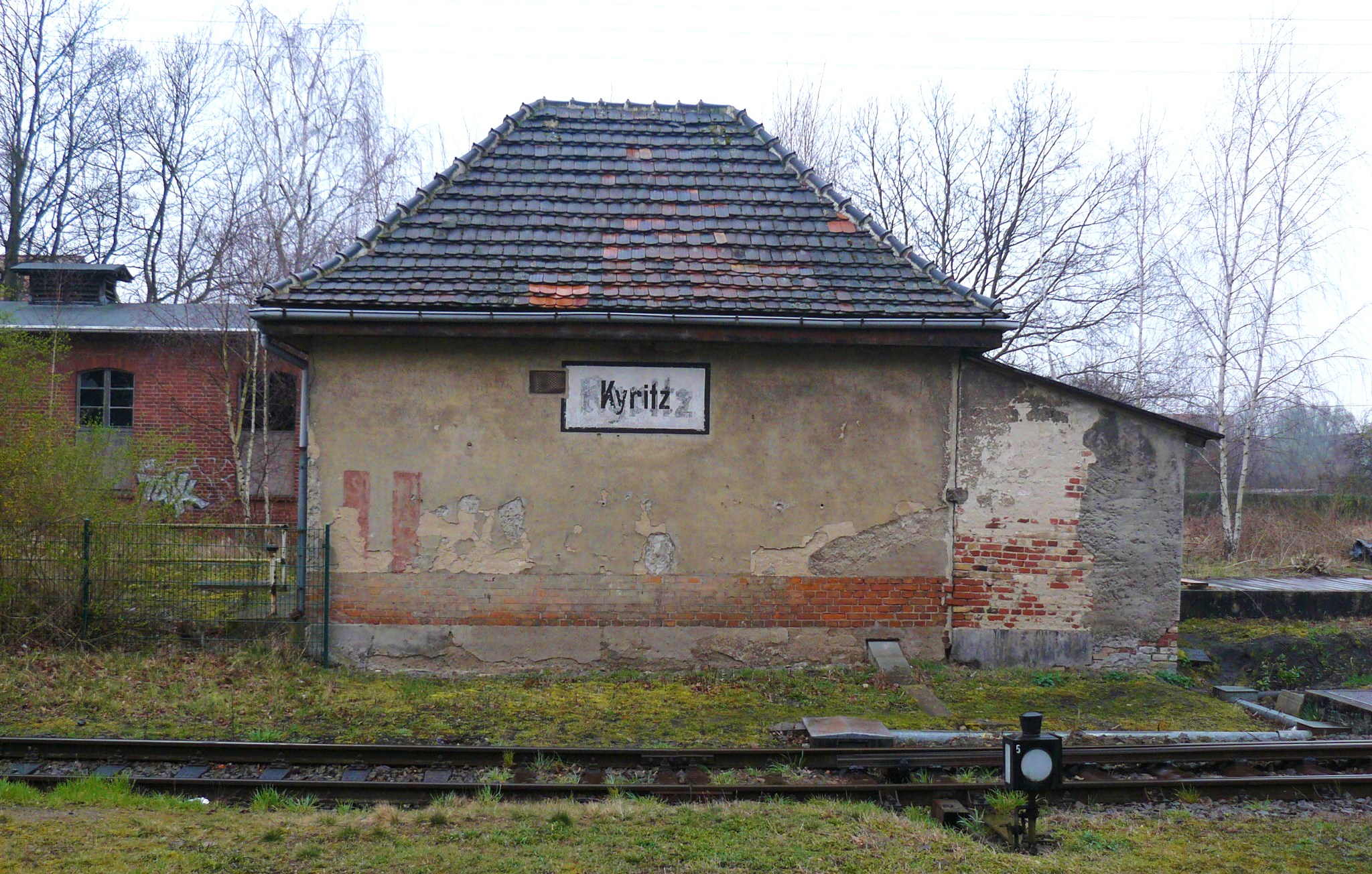 Kyritz.